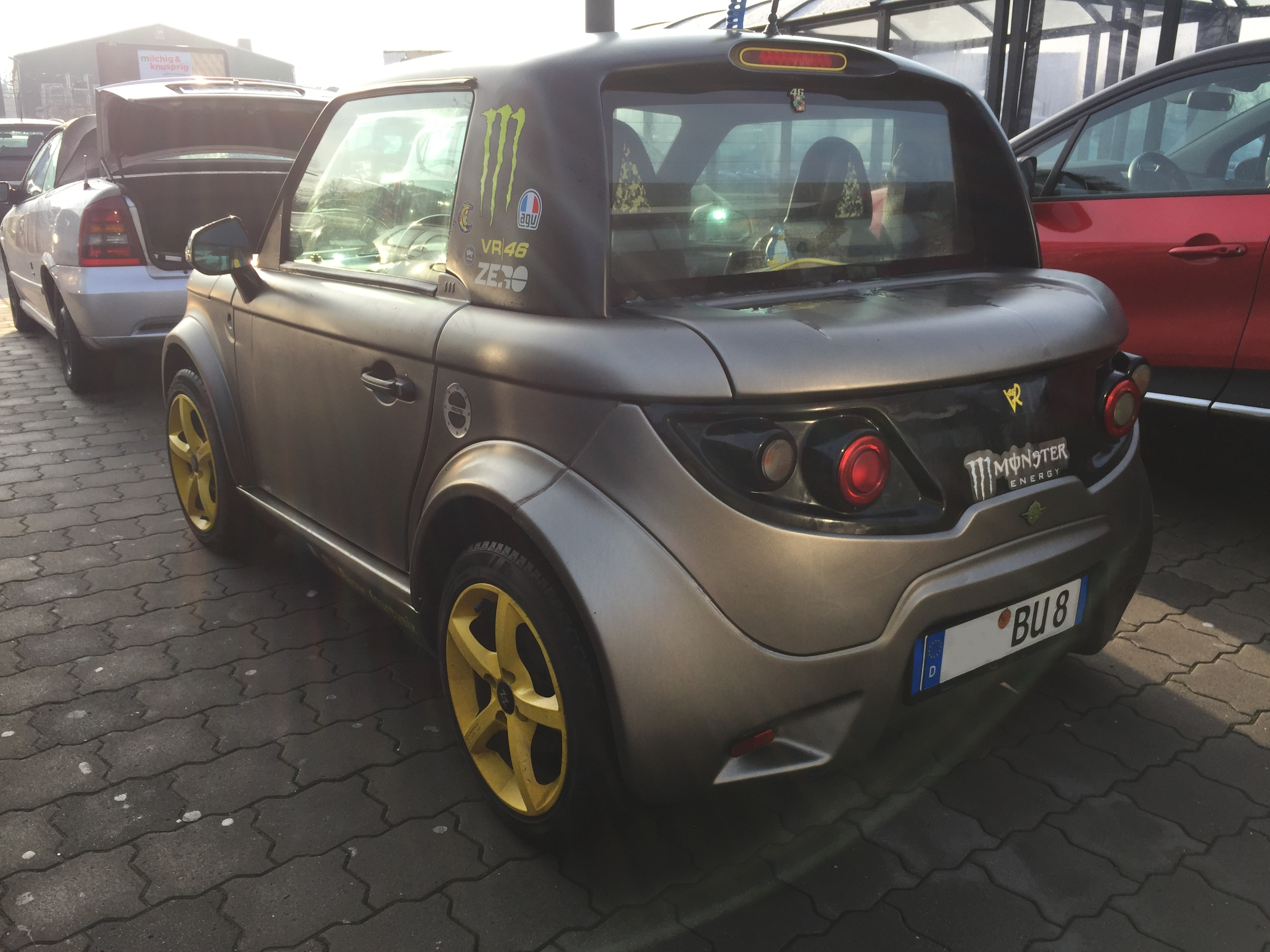 Tazzari Zero Heckansicht